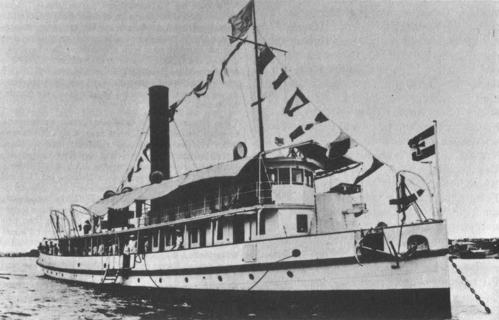 Das Flußkanonenboot SMS Vaterland.